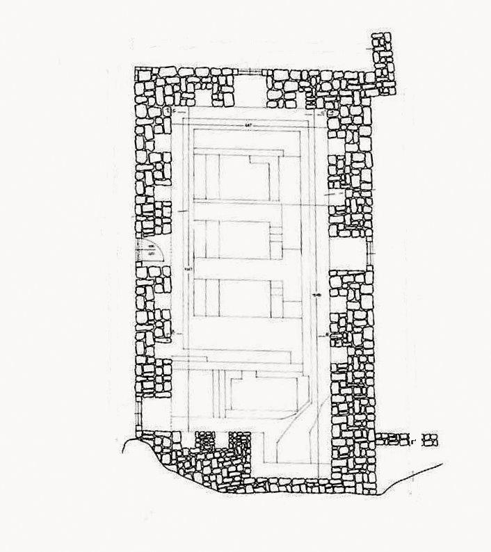 Le Terme Arabe di Cefalà Diana